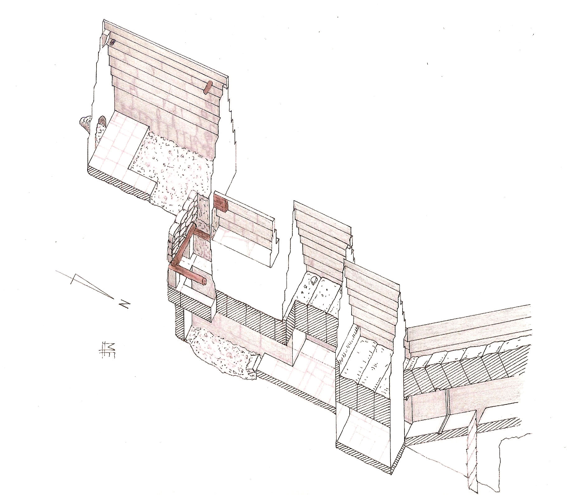 Vue axonométrique des appartements funéraires de la pyramide de Meïdoum